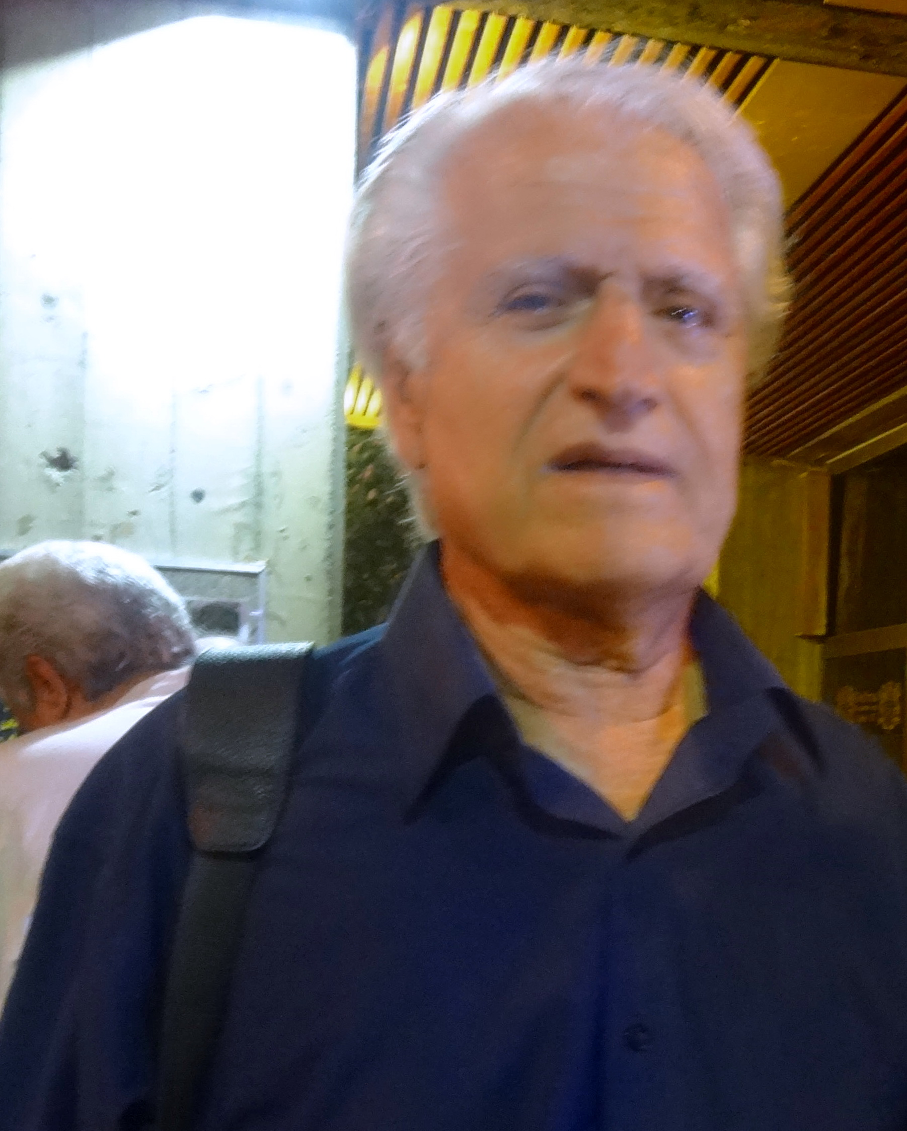 احمد پژمان در نخستین برنامه سال نوای موسیقی ایران آئین نکوداشت و تجلیل از مقام هنری ابراهیم لطفی ۸ خرداد ۱۳۹۴ فرهنگسرای نیاوران